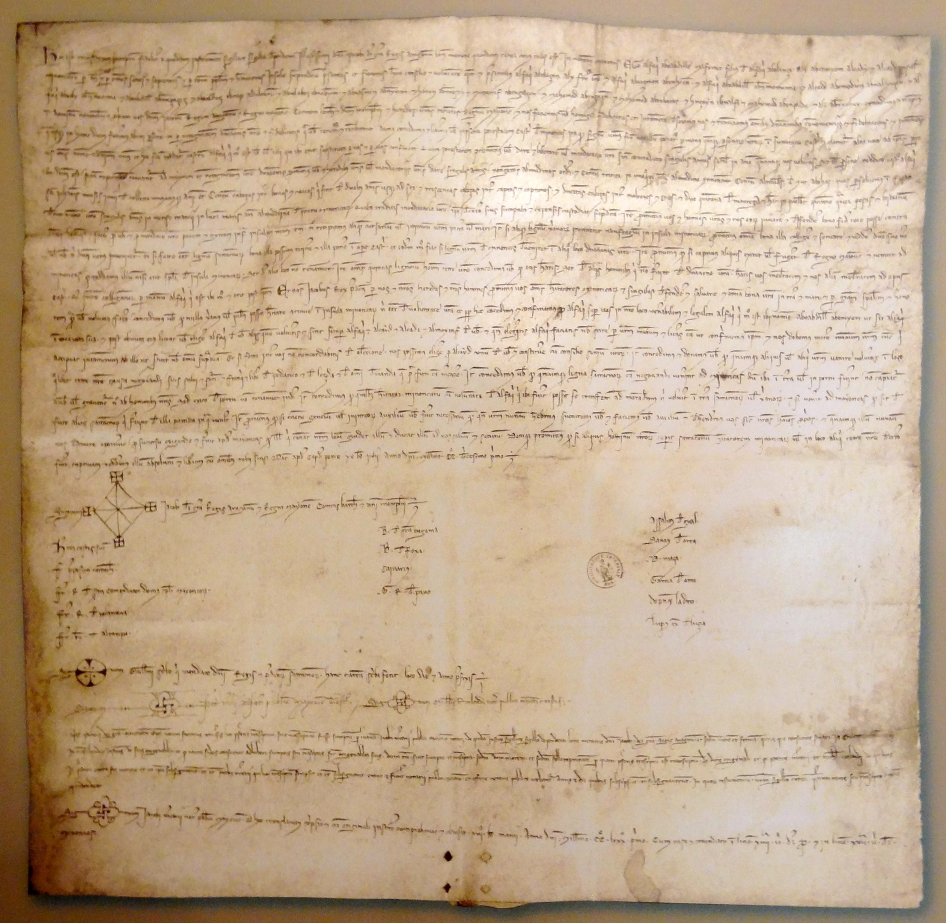 „Vertrag von Capdepera“ – Friedensvertrag zwischen Jakob I., König von Aragon, und Abū ʿAbd Allāh Muḥammad ibn Hishām, Al-faqīh (Rechtsgelehrter) von Manūrqa (Menorca), vom 17. Juni 1231, ausgestellte Kopie im Gouverneurshaus im Castell de Capdepera, Gemeinde Capdepera, Mallorca, Spanien